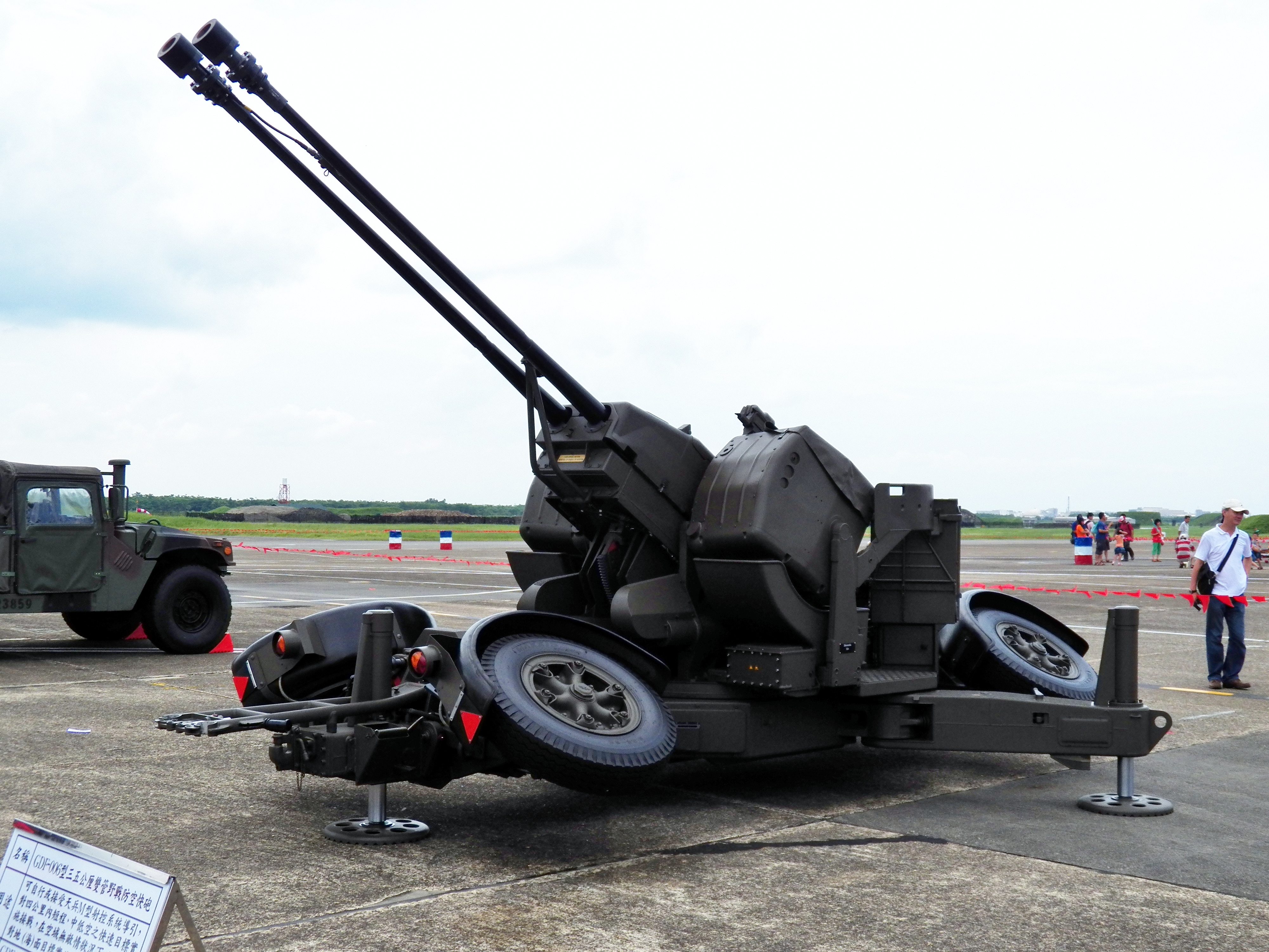 2012年空軍嘉義基地營區公開活動，展示之奧立崗GDF-006 35聯裝快砲。